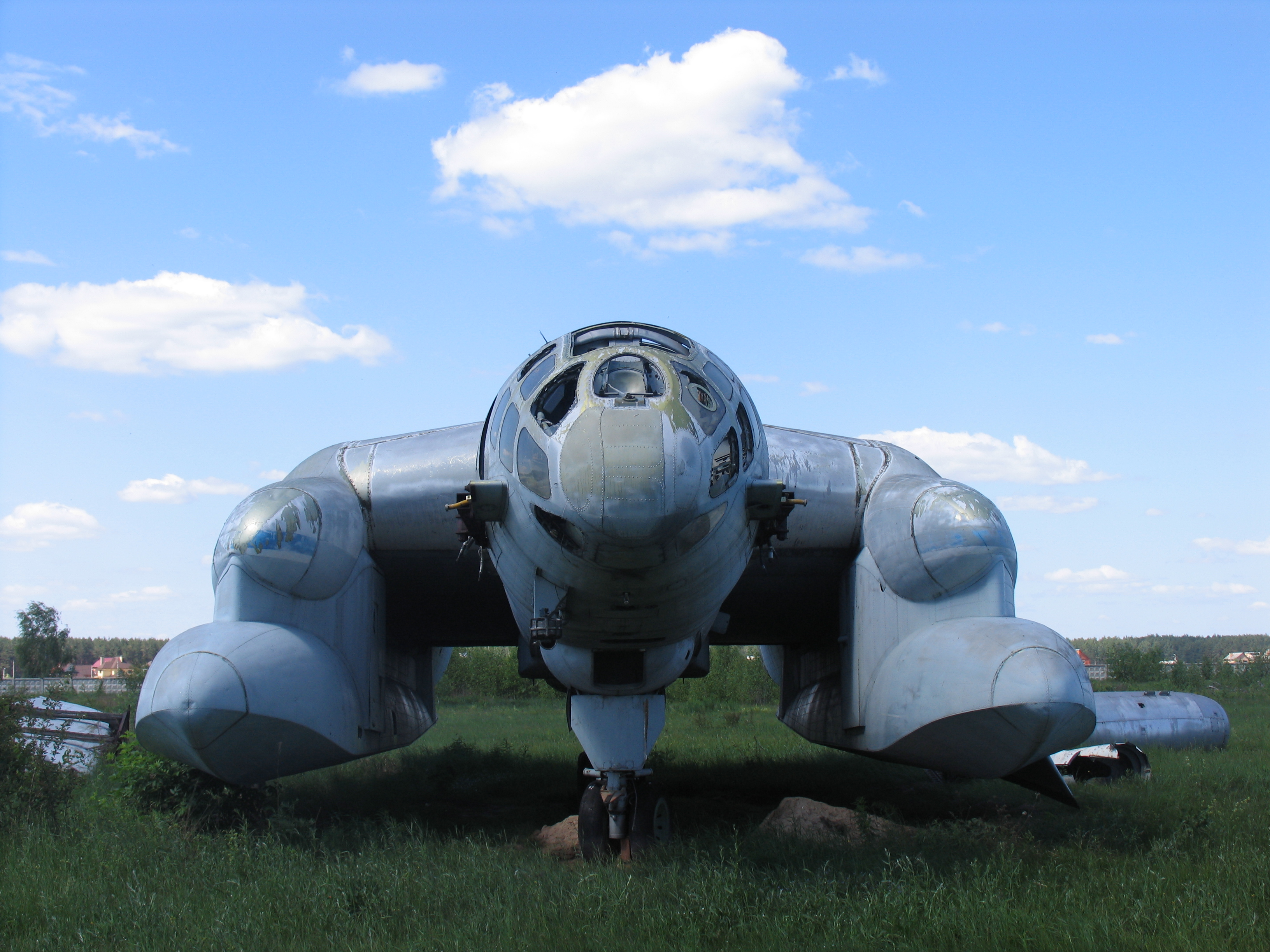 Самолёт-амфибия ВВА-14. Вид спереди.